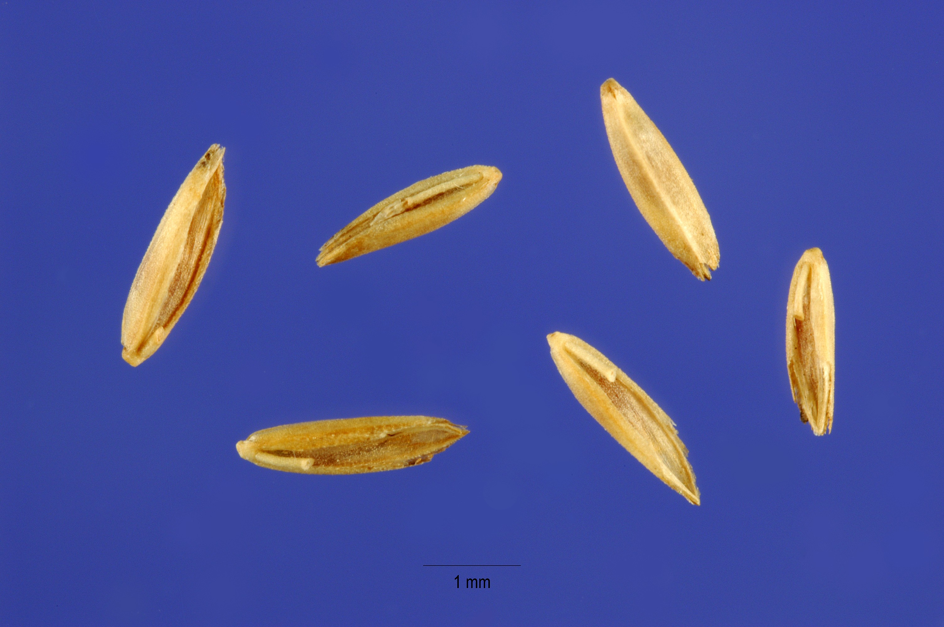 Poa compressa seeds